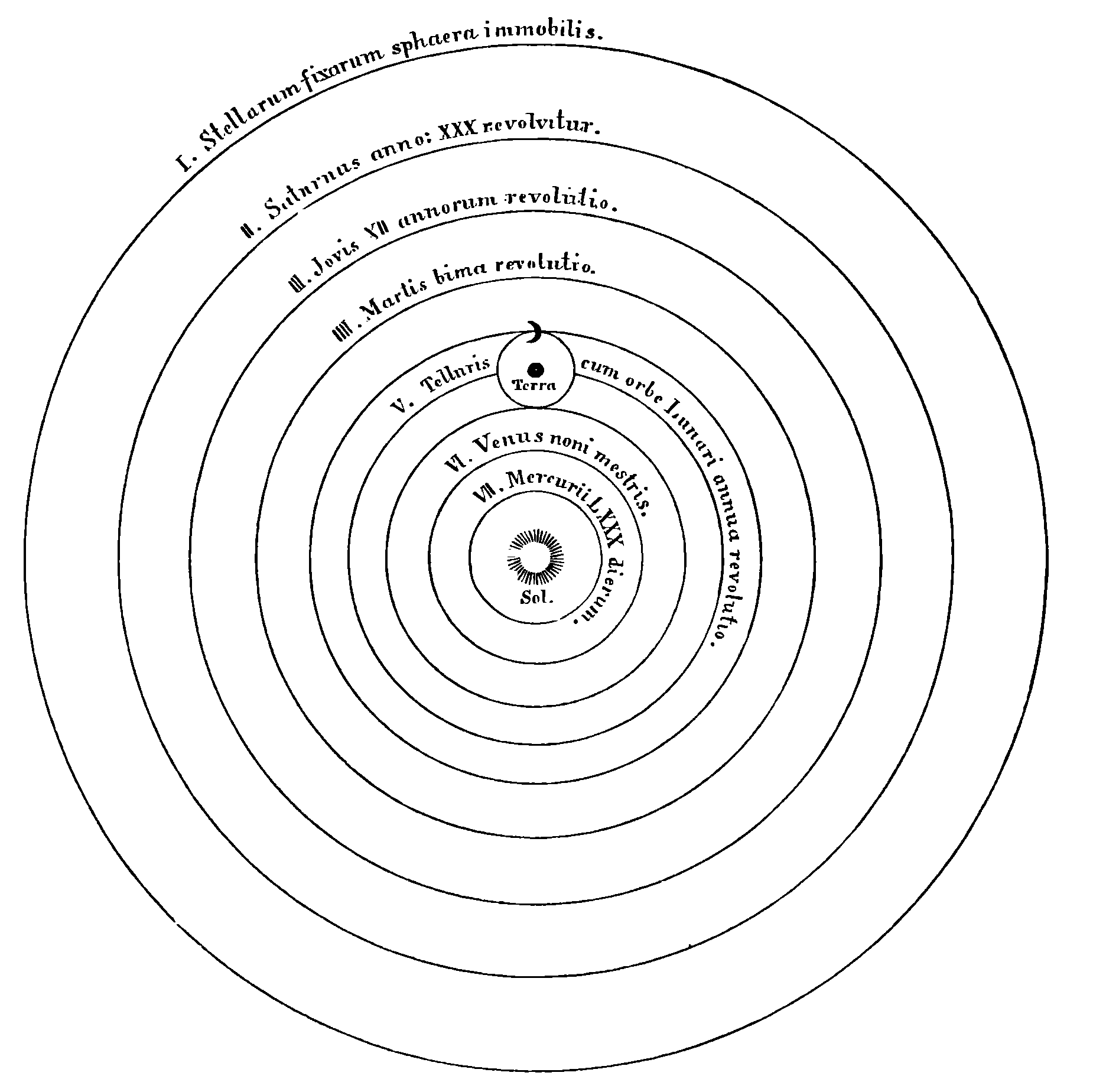 Sonnensystem